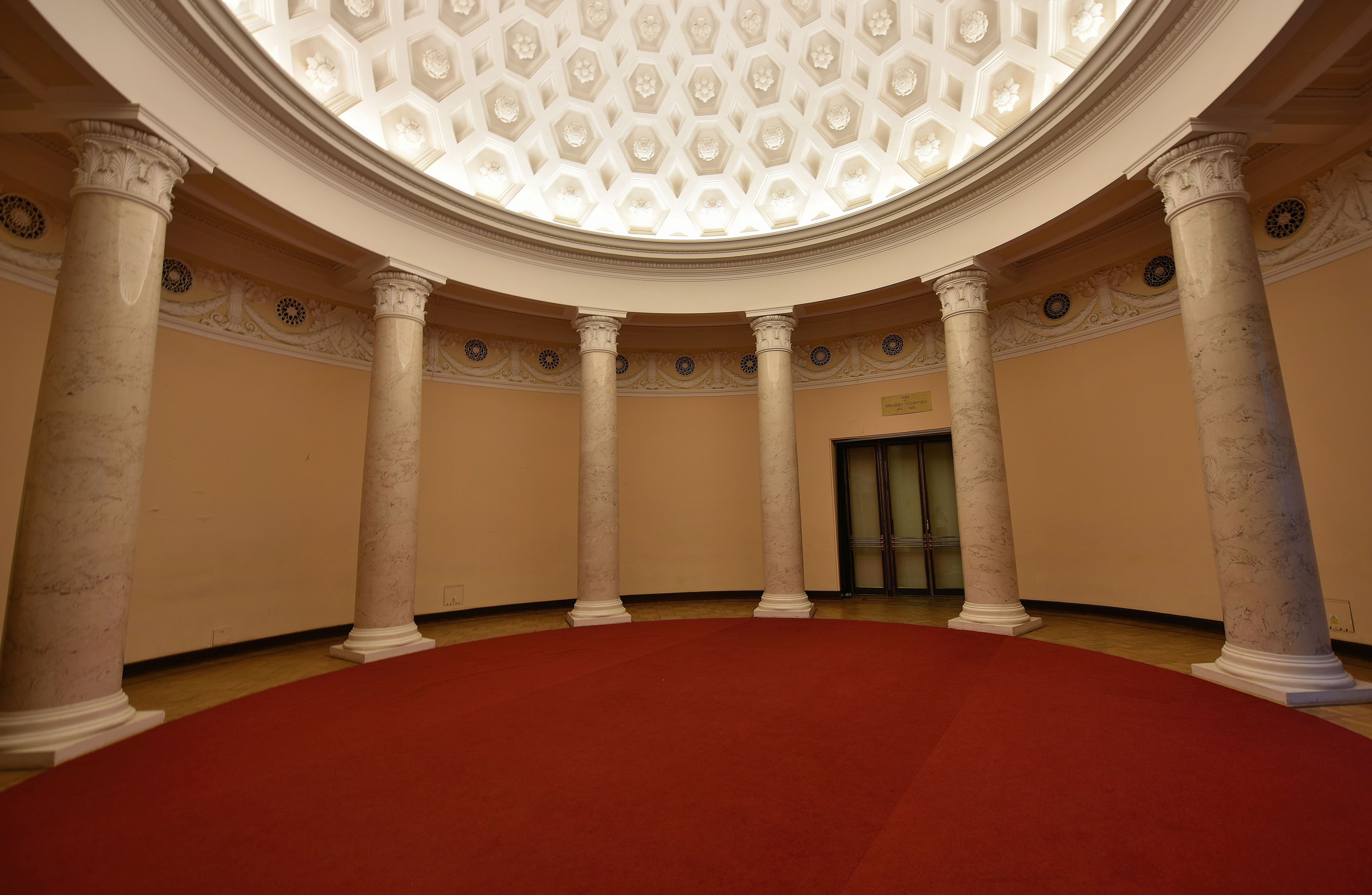 Sala im. Mikołaja Kopernika w Pałacu Kultury i Nauki